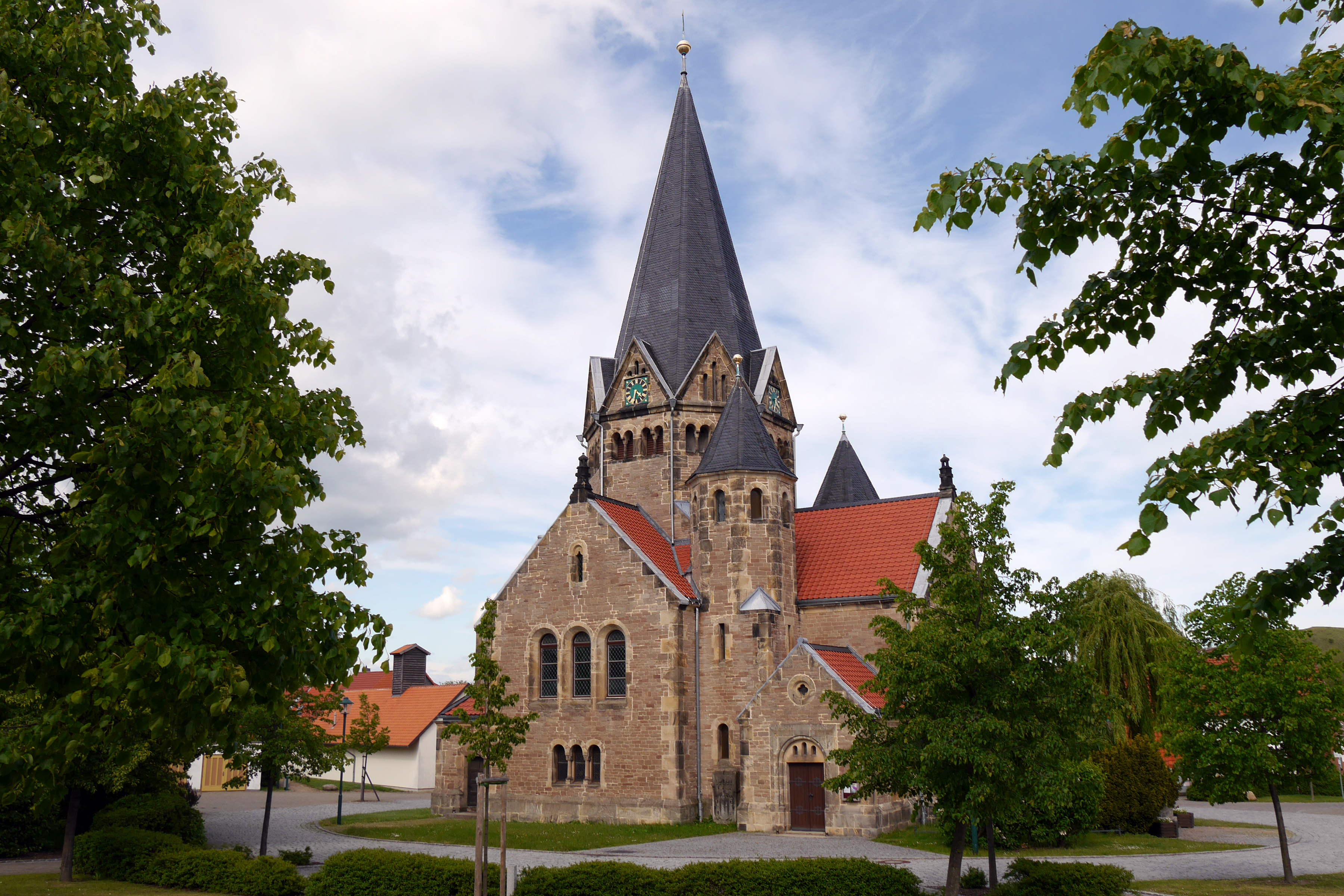 Blick auf die Dorfkirche Benzingerode bei Wernigerode